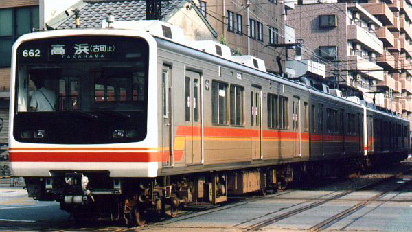 Iyotetsu Type 610 trainset.